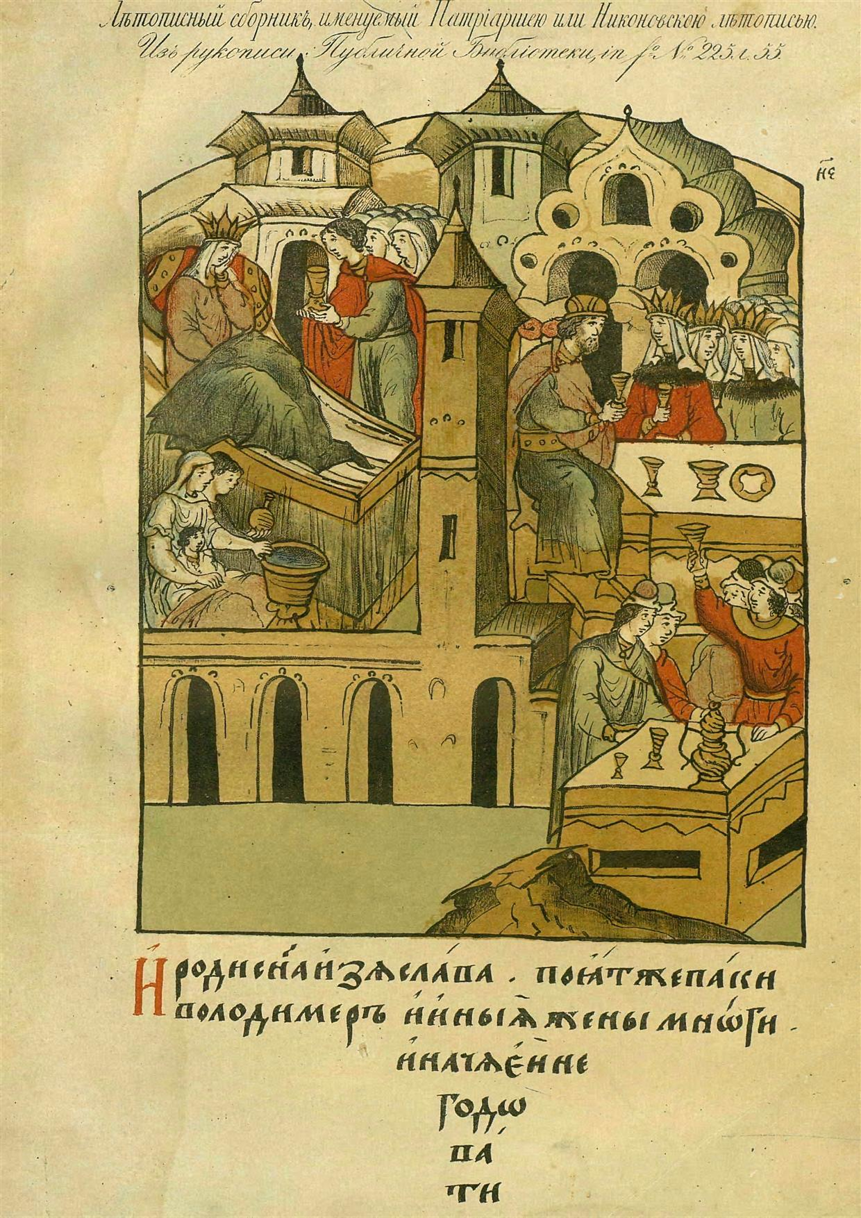 Миниатюра Никоновской летописи. XVI век